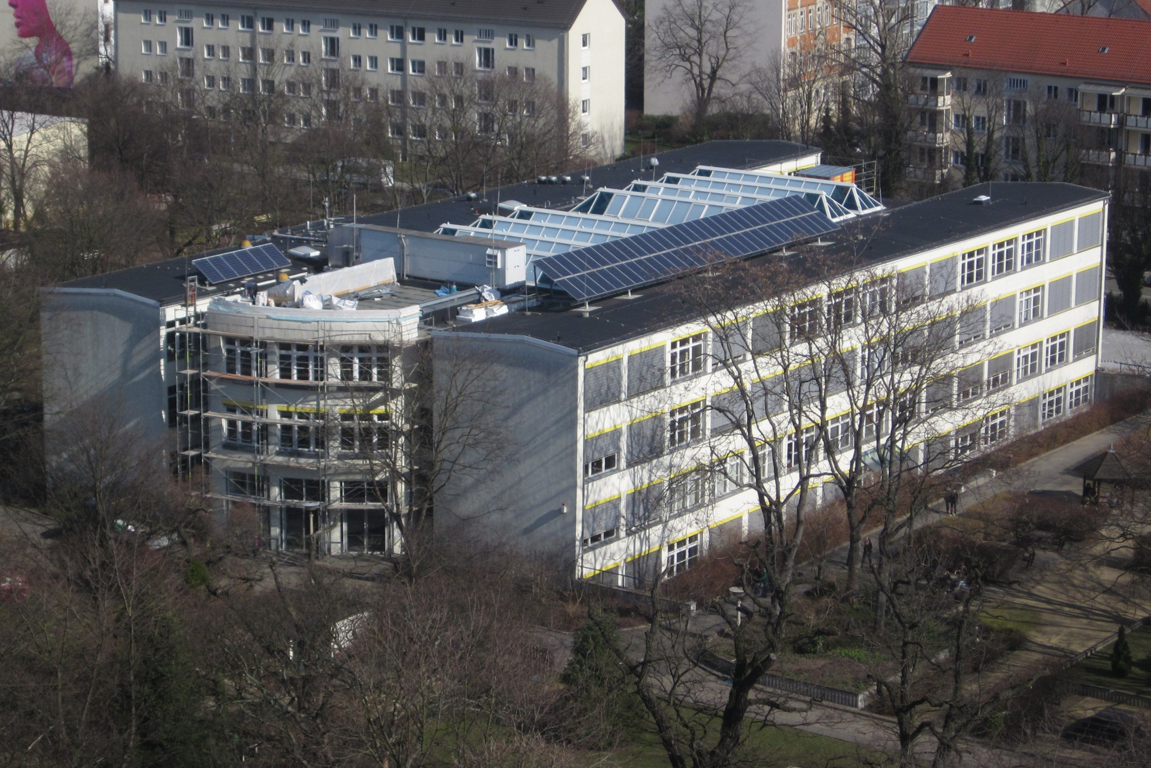 Dresden Johannstadt Bertolt-Brecht-Gymnasium